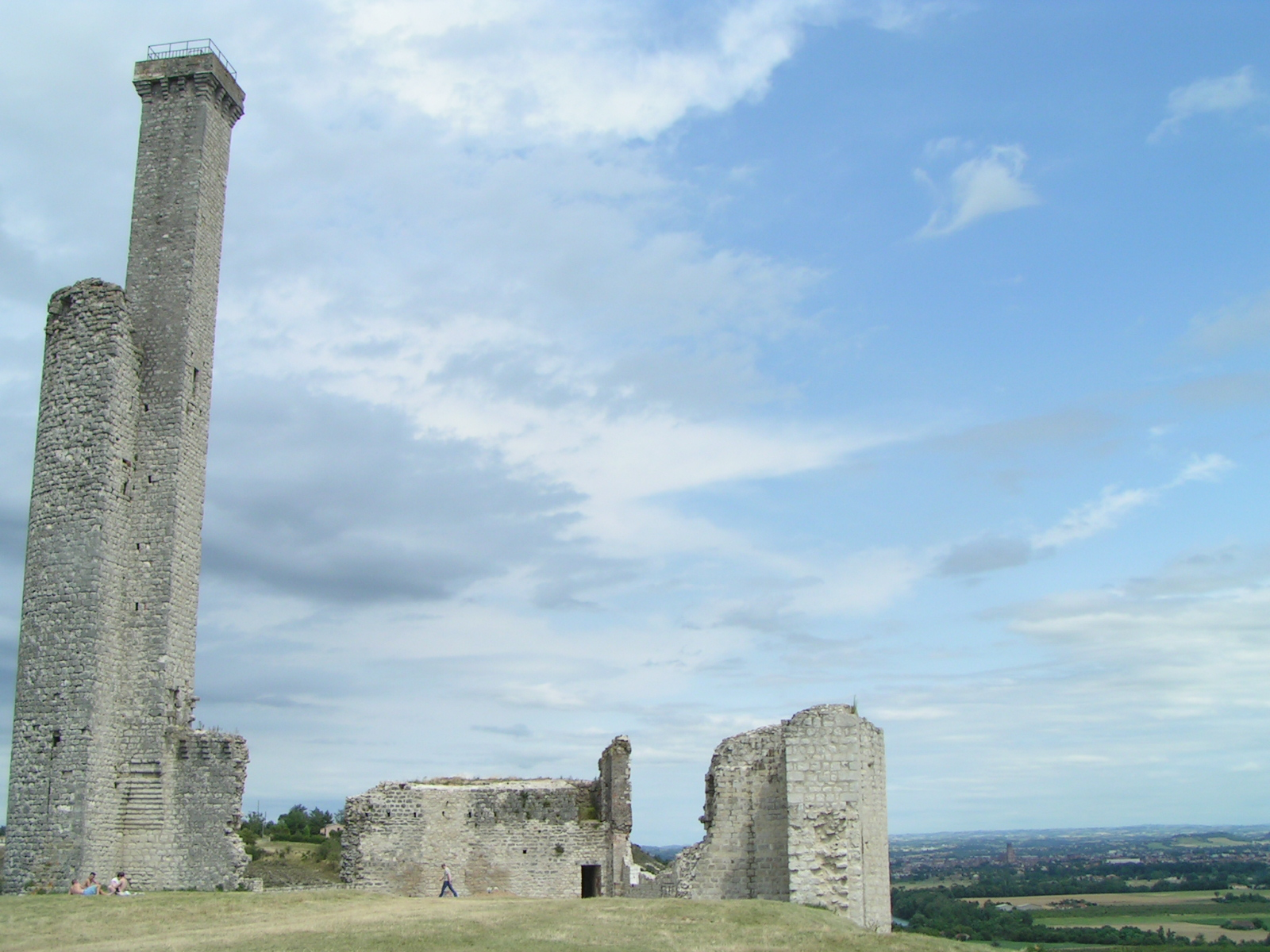 Vestiges du château de Castelnau-de-Lévis, près d'Albi.